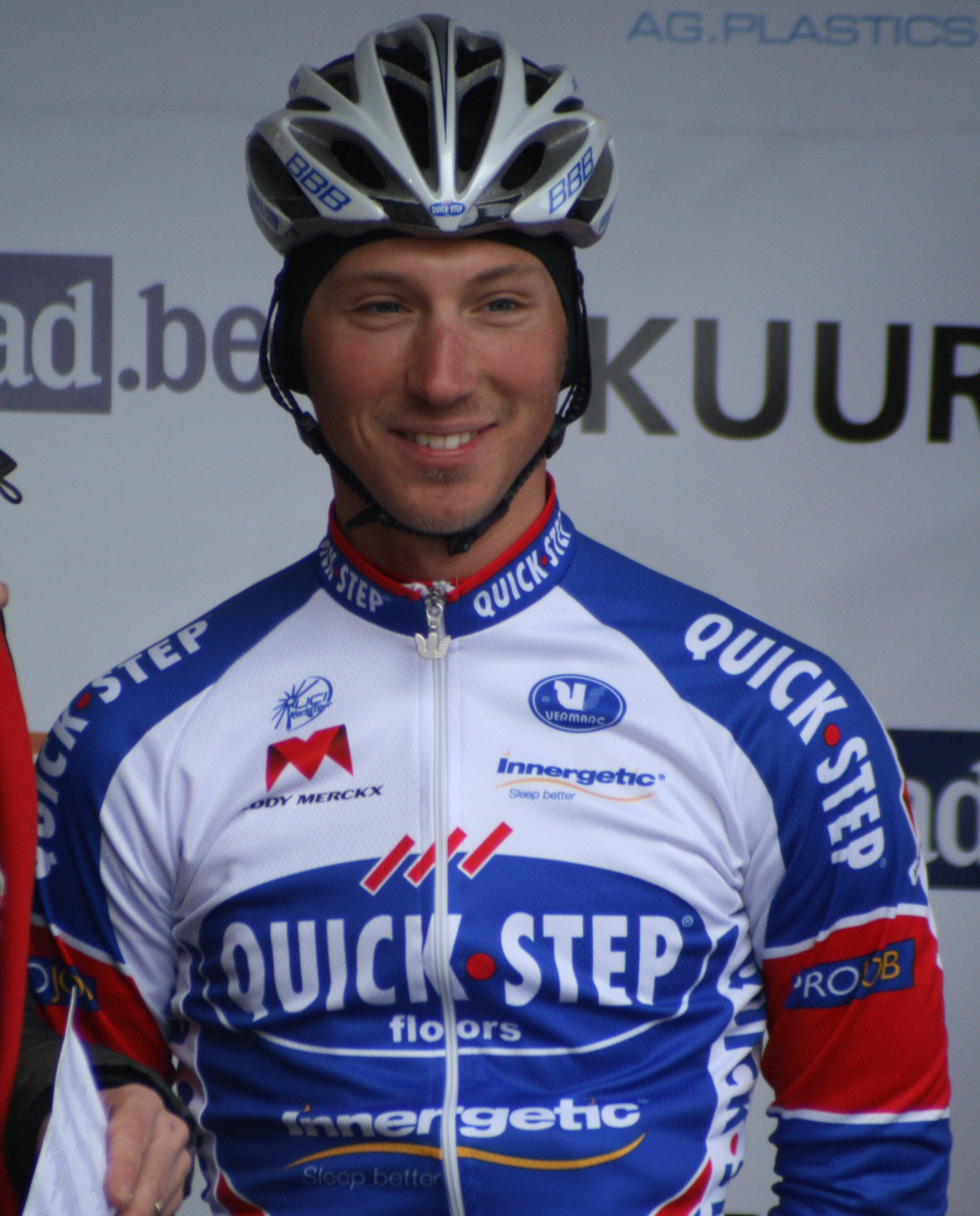 Kuurne-Bruxelles-Kuurne 2011, Marco Bandiera